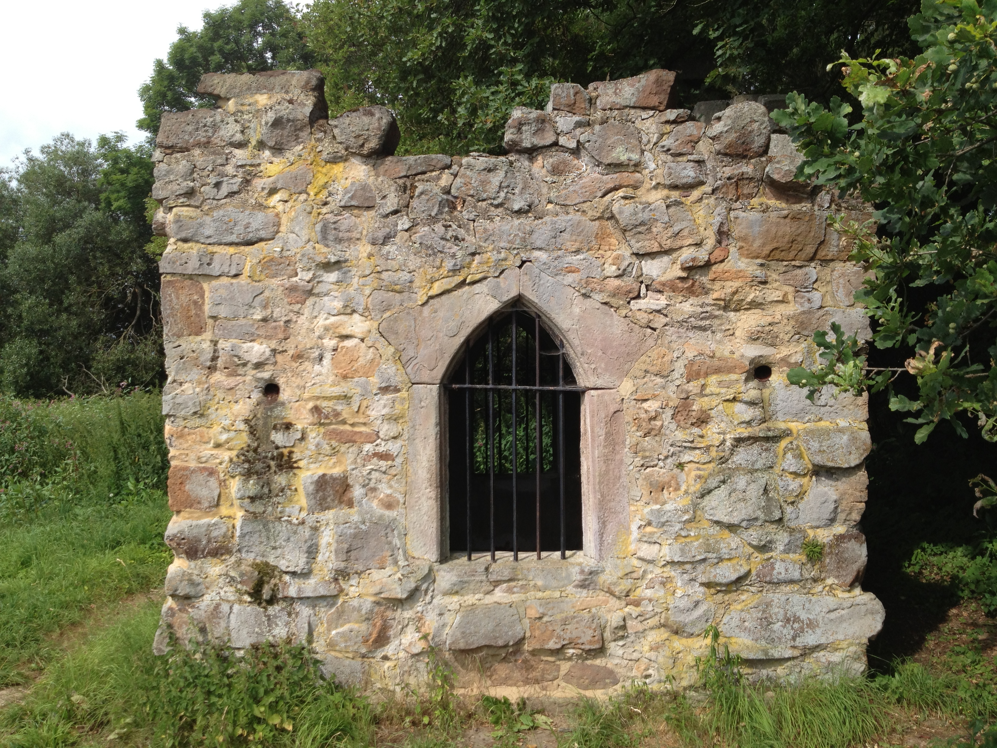 Kassel-Steig nahe Gut Windhausen